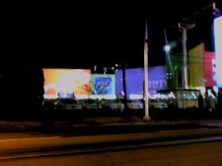 2007년에 제가 직접 찍어서 네이버 카페에 올린 사진입니다.